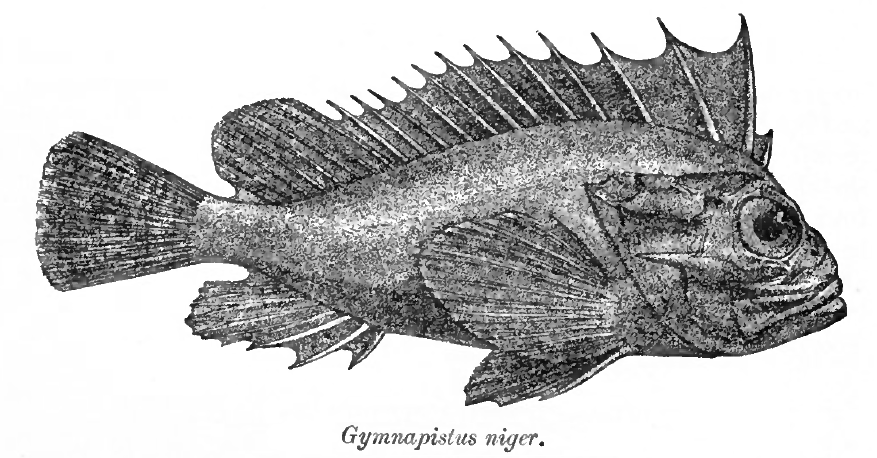 Gymnapistus niger = Tetraroge niger (Cuvier, 1829)